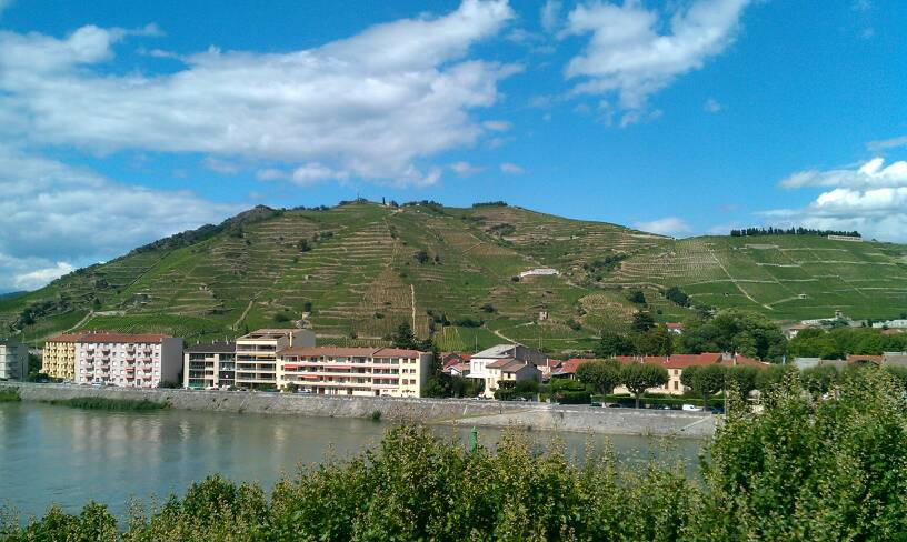 Vignobles dominant Tain l'Hermitage